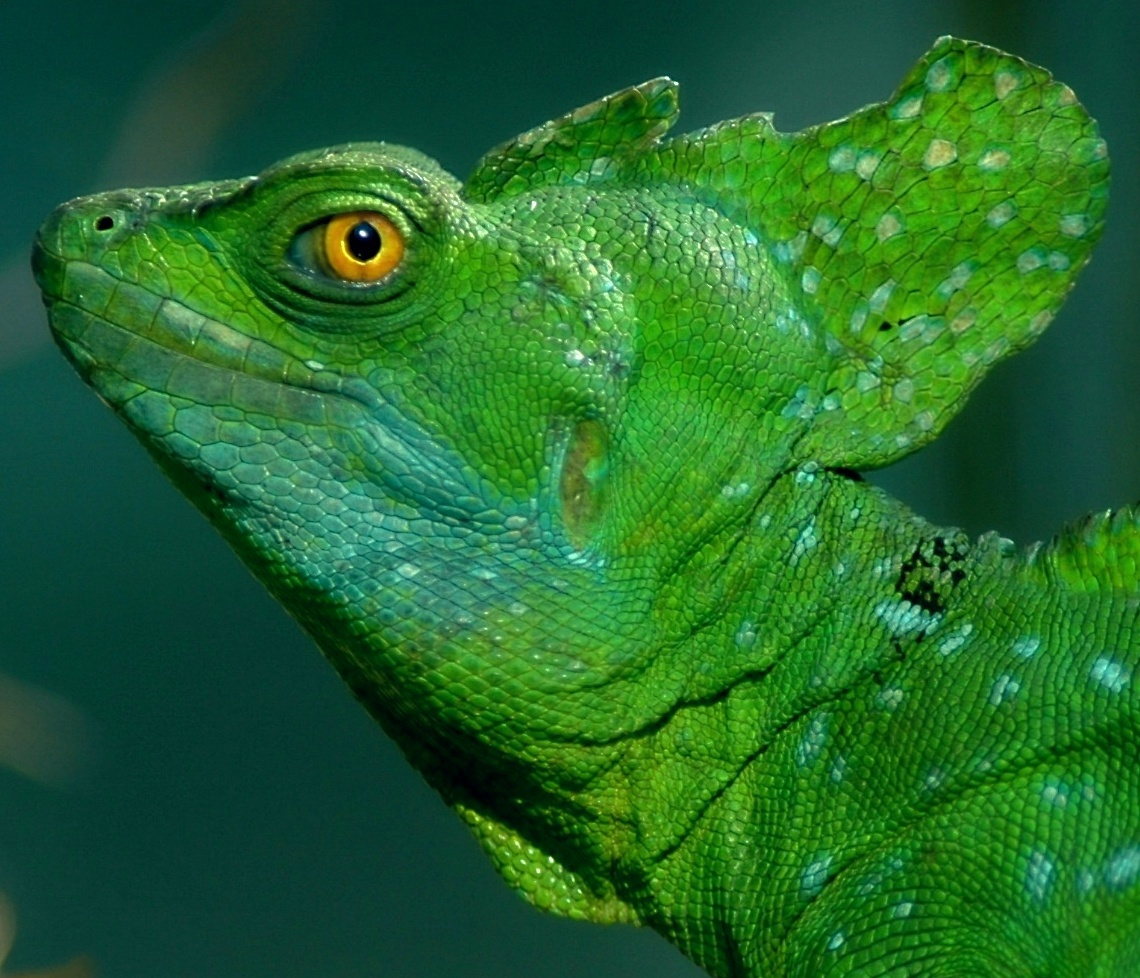 Kopf_des_Stirnlappenbasilisken_im_Profil